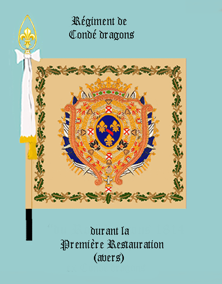 Standarte des Kavallerieregiments „Condé“ 1814 Königreich Frankreich (Vorderseite)